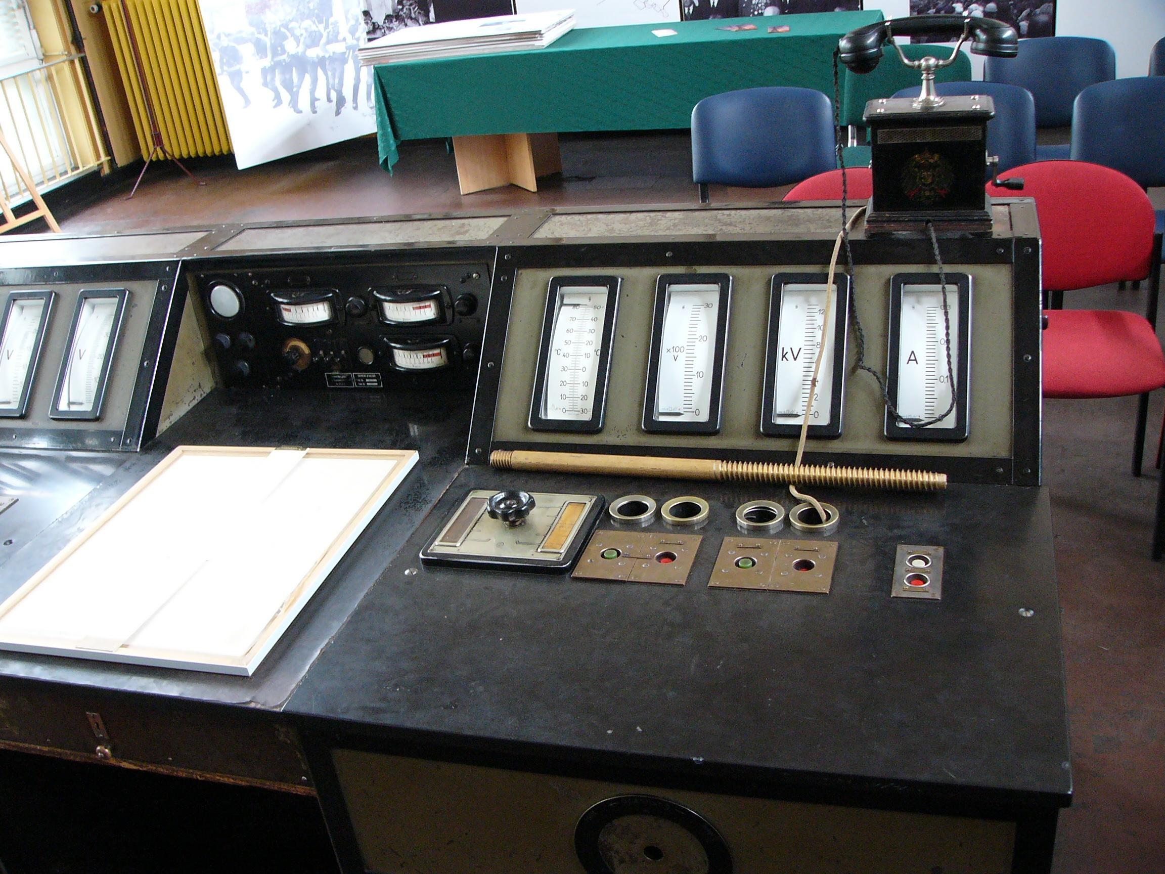 Im Innern des Gleiwitzer Radiosenders. Auf dem Tisch liegt eine Schraube (Gewindestange), wie sie für den Bau des Funkmastes benutzt wurden.